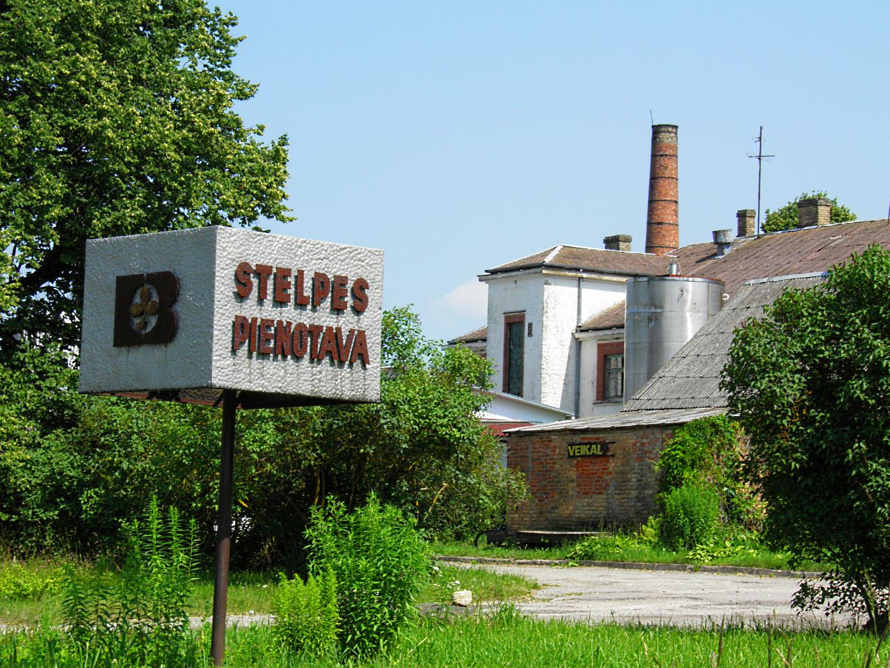 Стелпес пиенотава